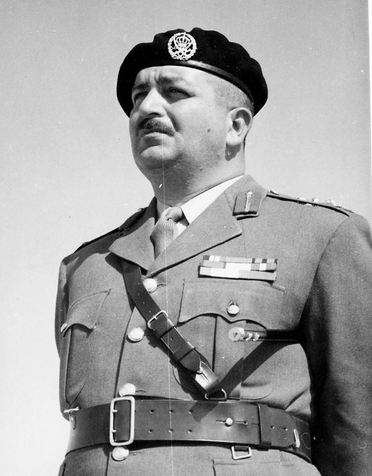 ناصر بن جميل